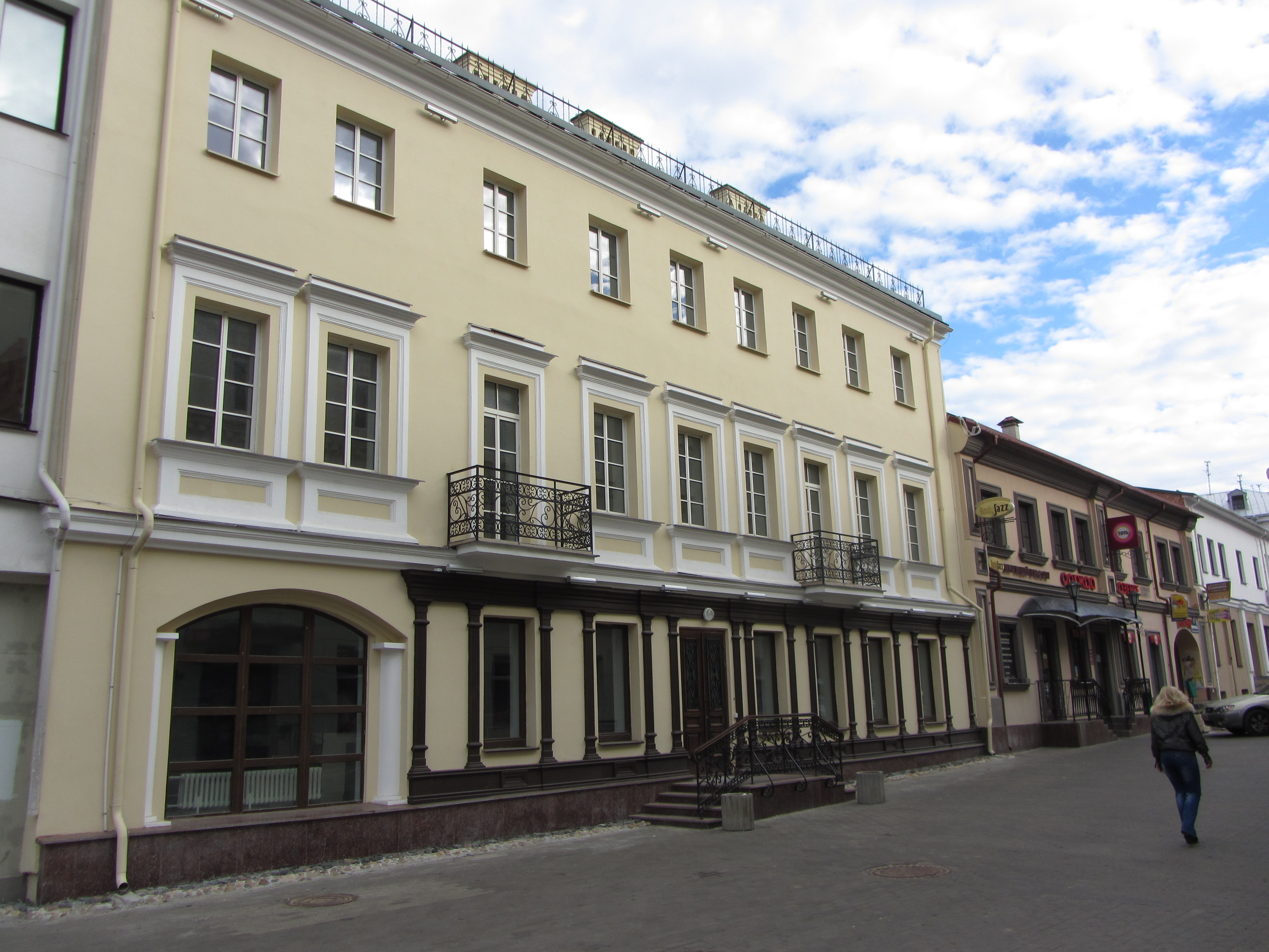 Беларуская (тарашкевіца): Камсамольская 5, Менск